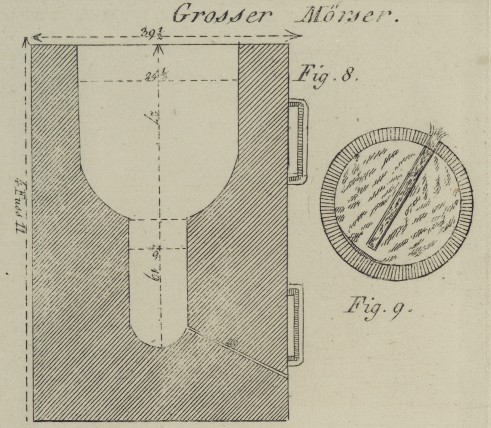 Monstermörser für die Belagerung von Antwerpen von Henri Joseph Paixhans (Fig. 8: Durchschnitt des Mörsers; Fig. 9: Durchschnitt einer Bombe mit Ladung und Zünder)